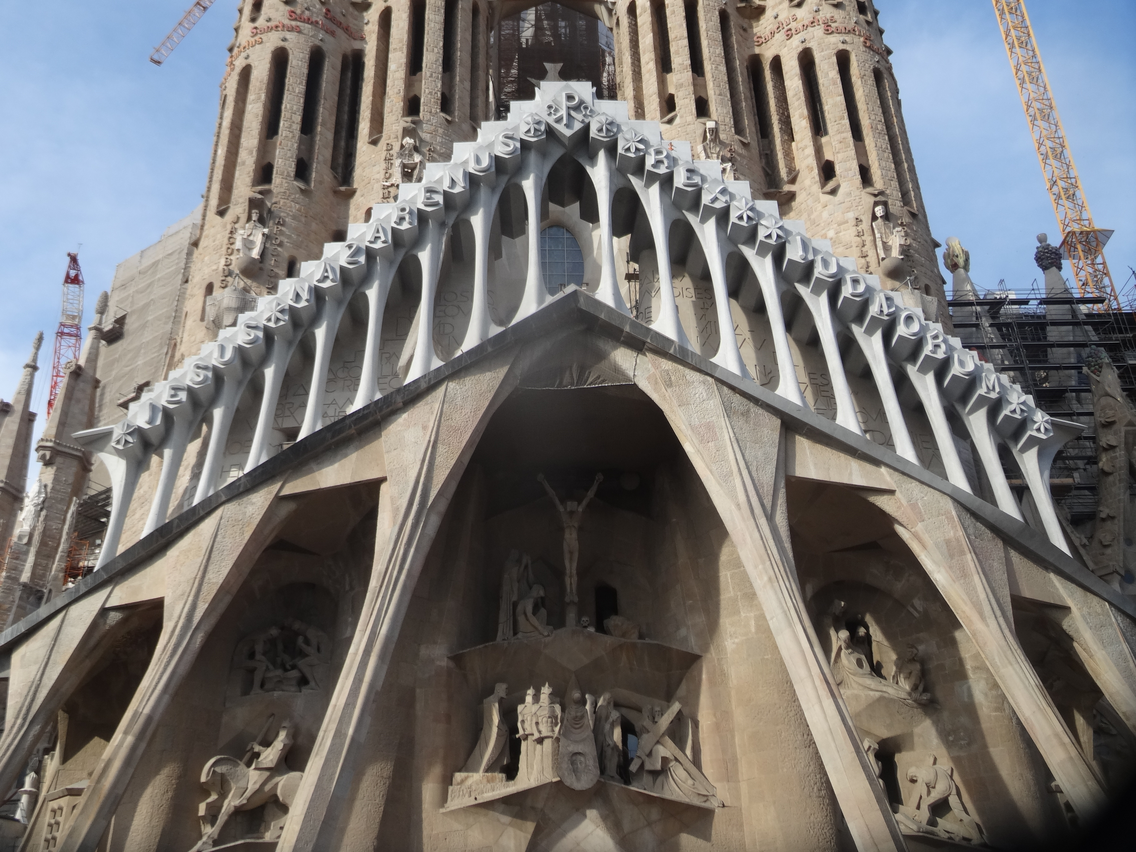 Sagrada Familia - Juny de 2016